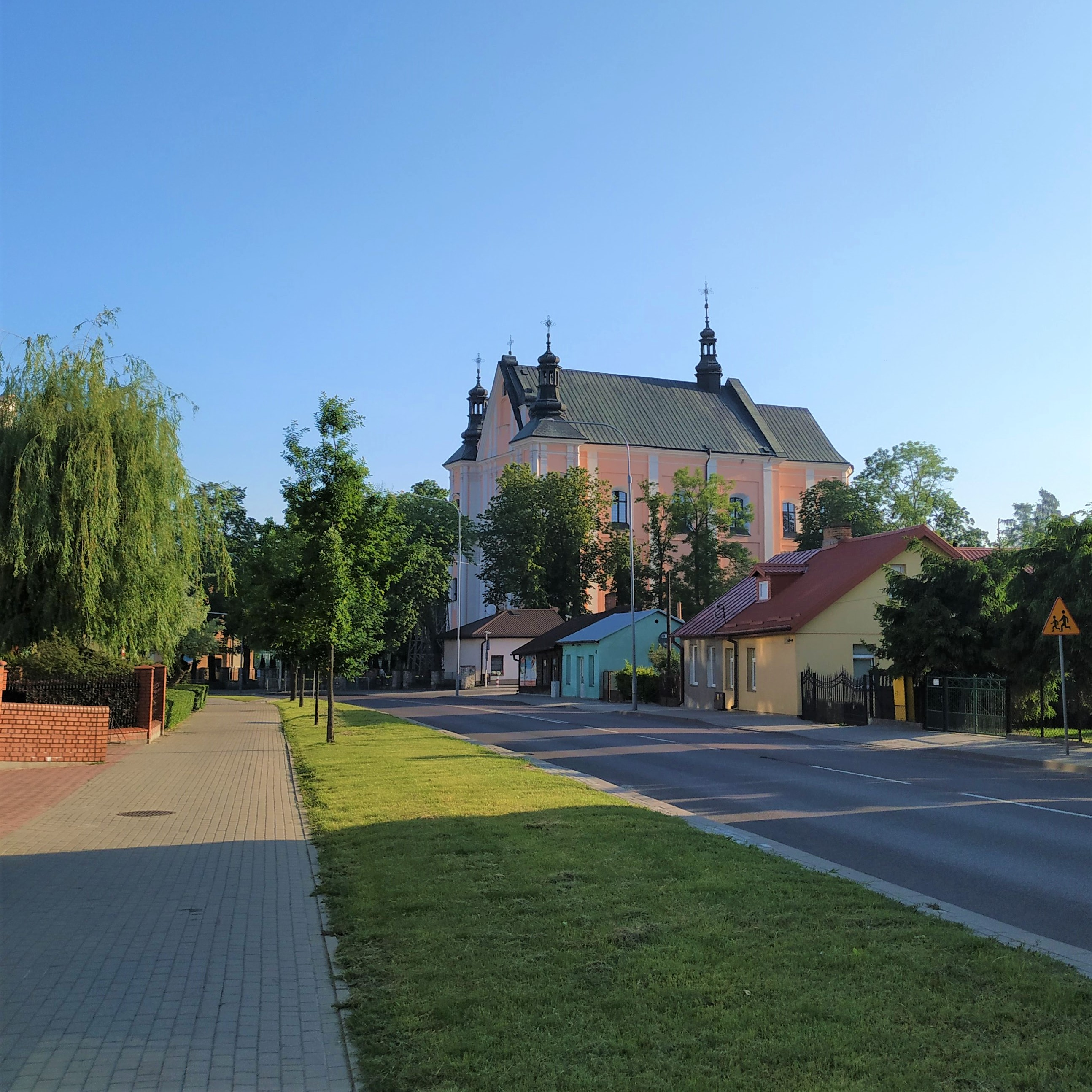 Łuków, kościół pw. Podwyższenia Krzyża Świętego